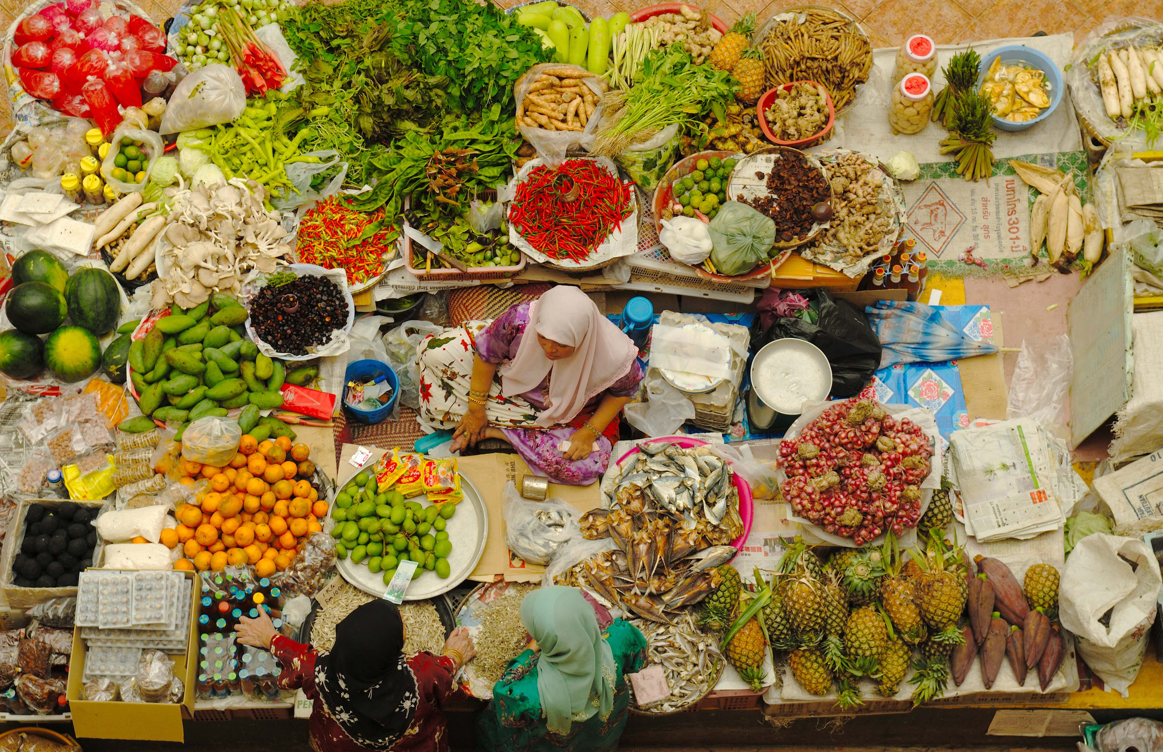 Malaysia